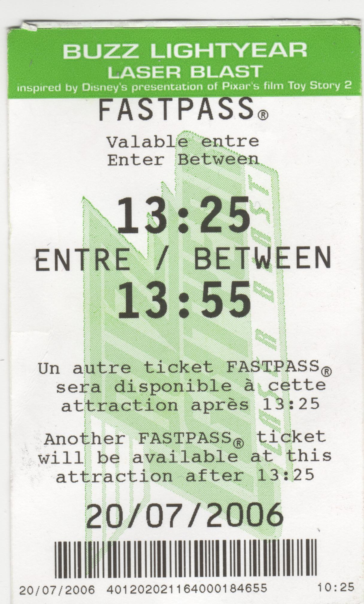 Ticket Fast Pass pour l'attraction Buzz Lightyears's Astro Blasters à Disneyland Paris.